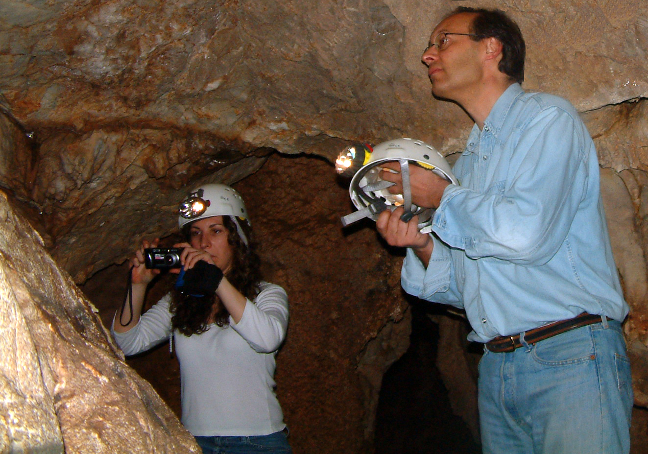 Jose Luis Sanchidrián inspeccionando la Cueva